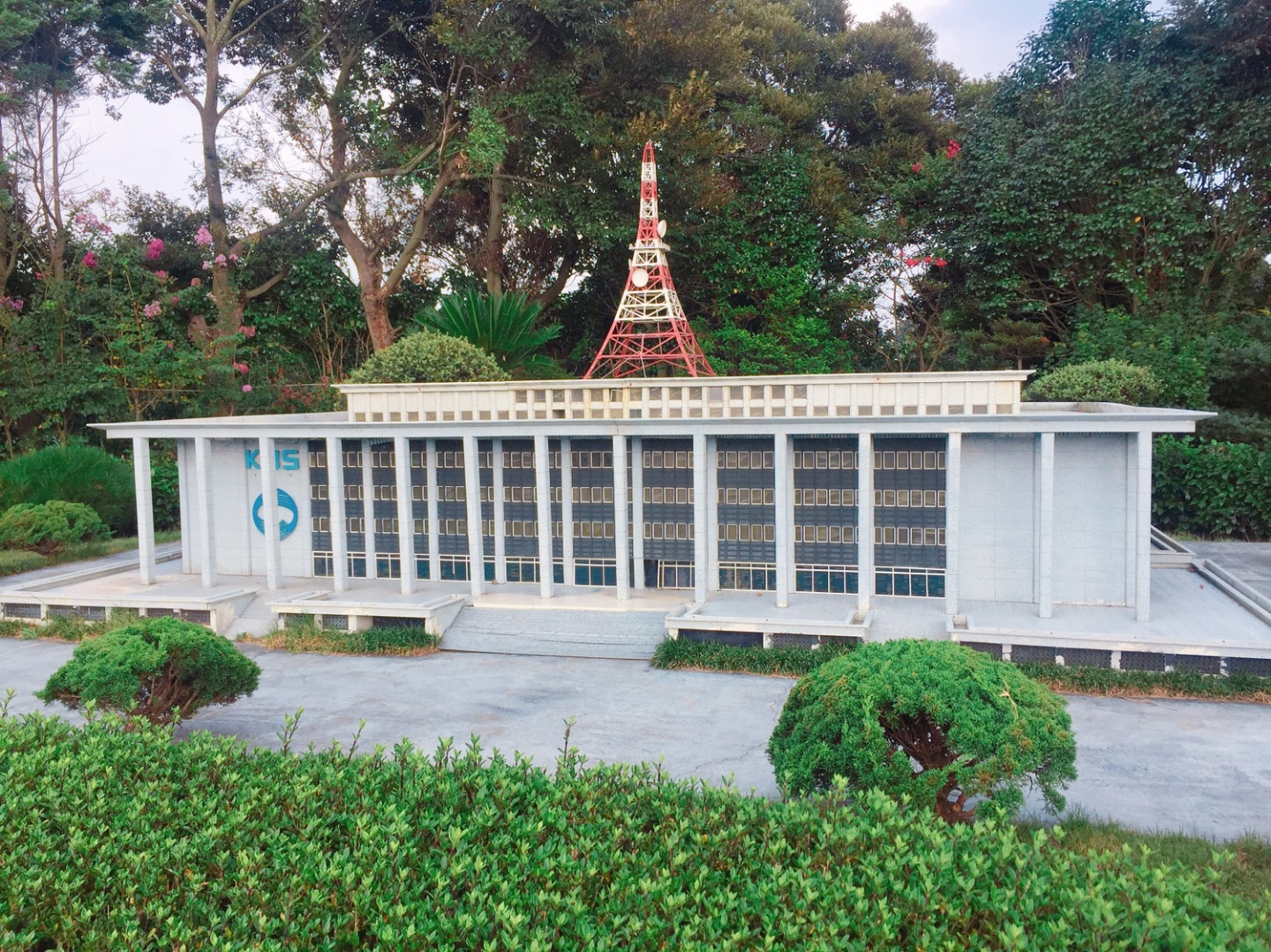 KBS 본관의 축소판